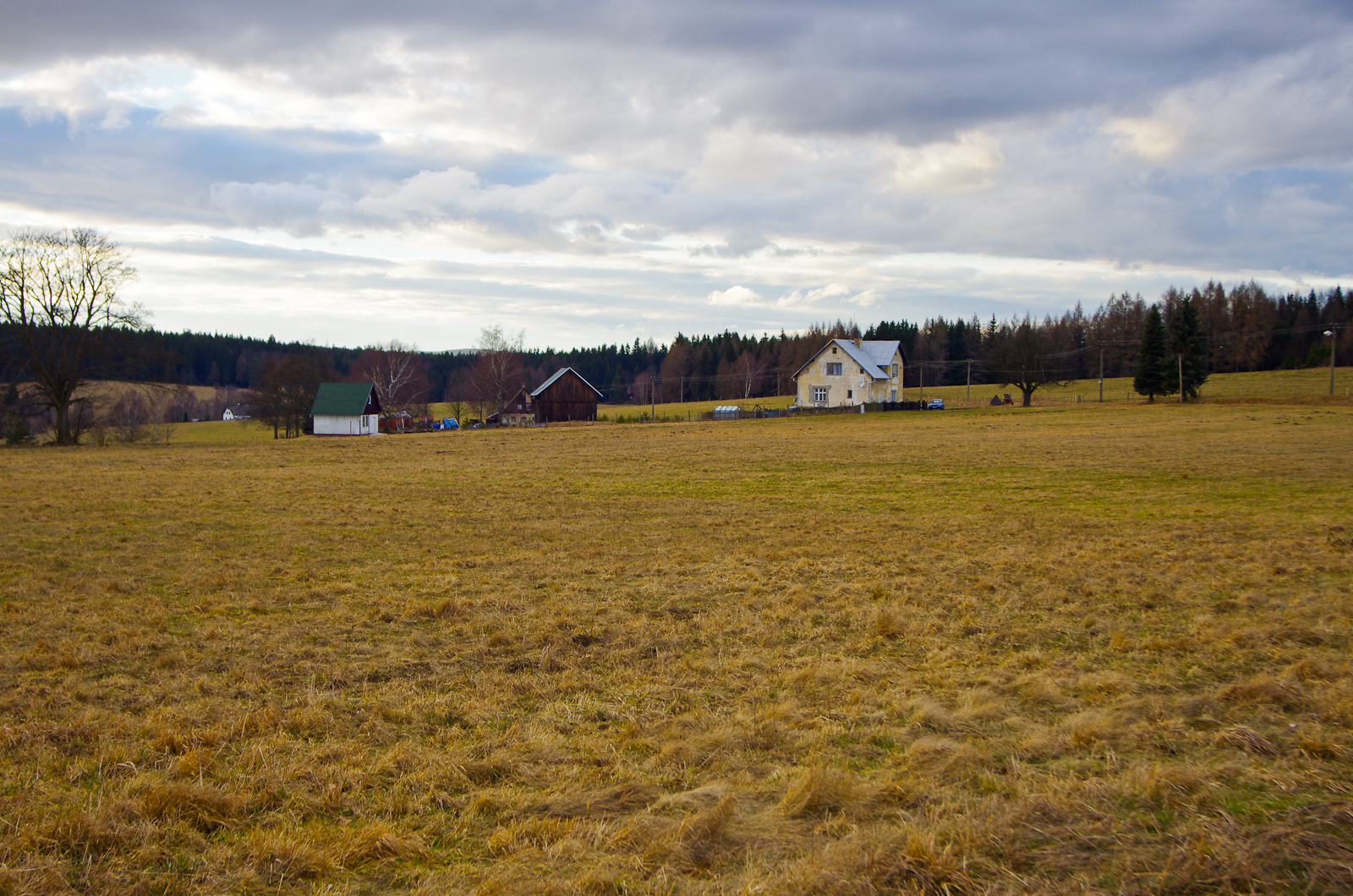 Horní Studenec u Oloví, Krušné hory, okres Sokolov